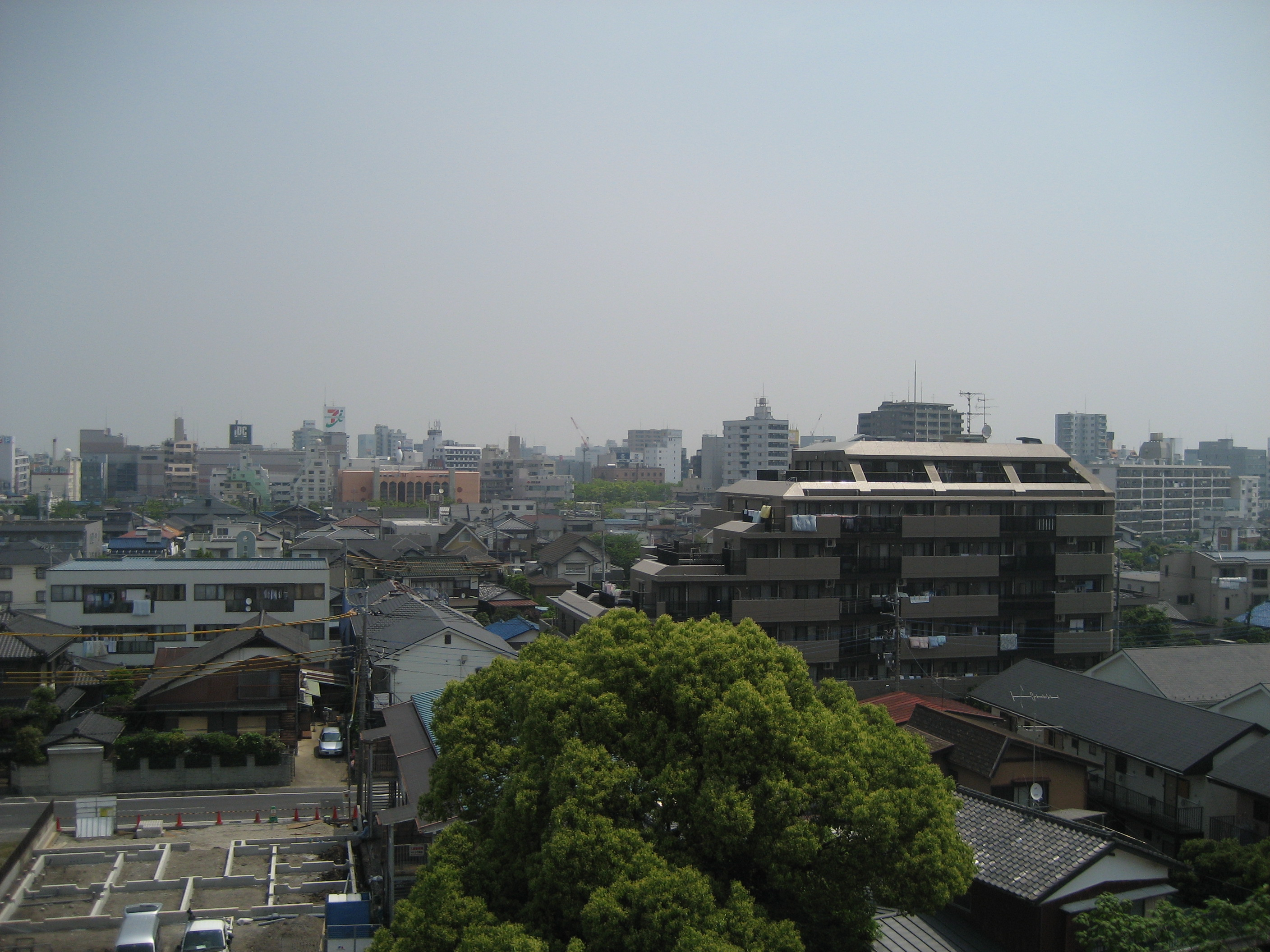 春日部市市街地